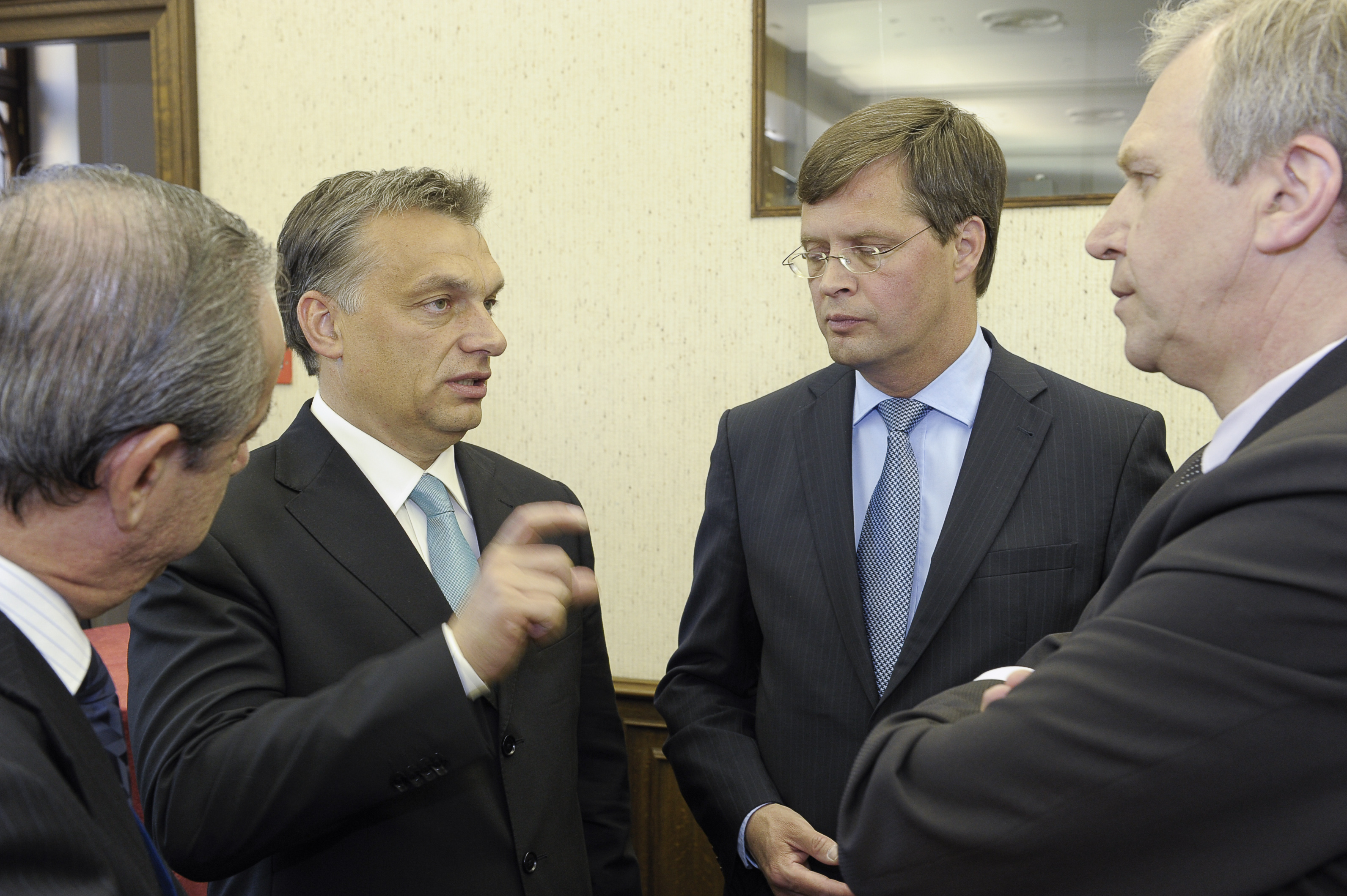 EPP Summit June 2010